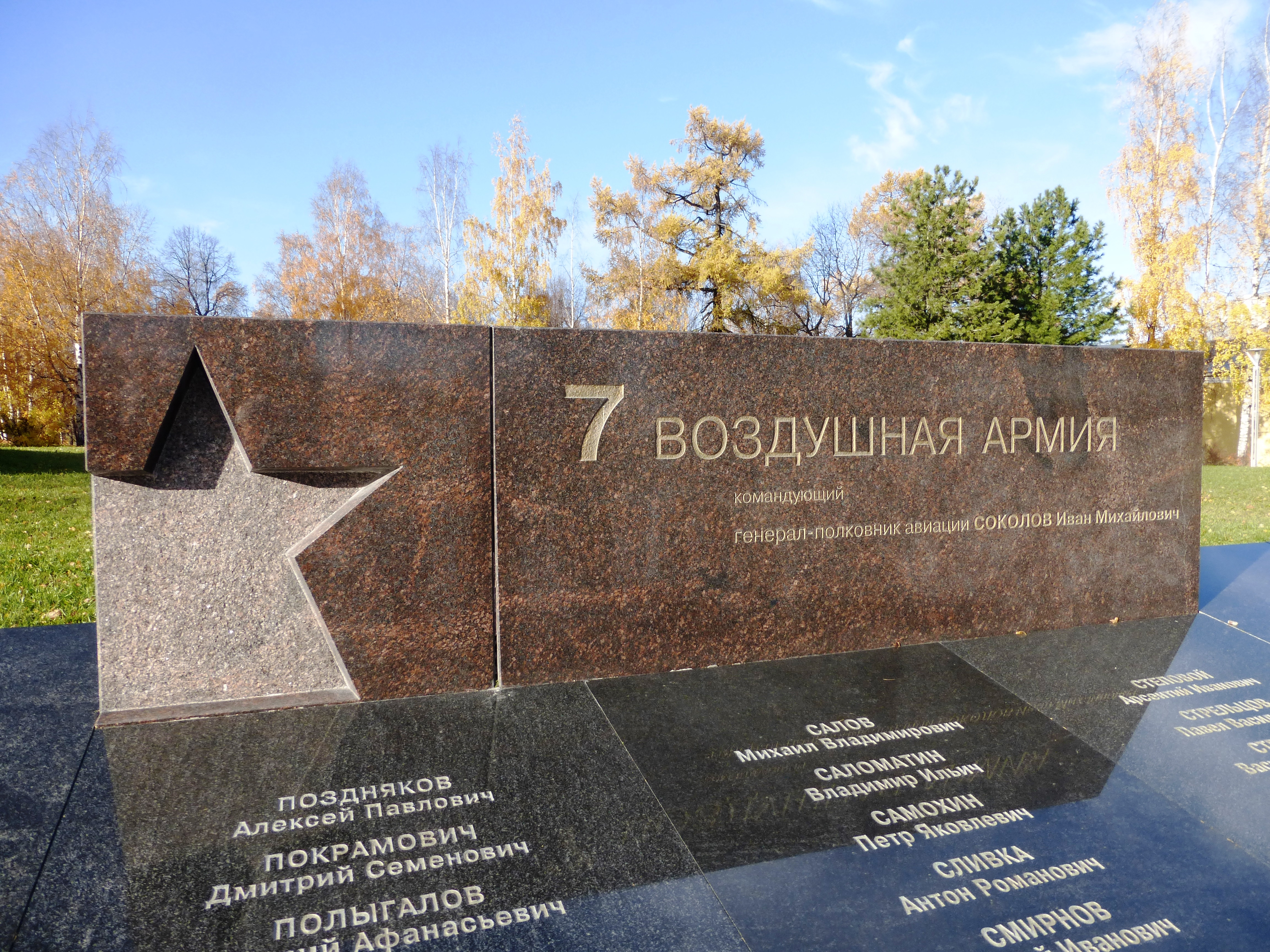 Фрагмент военно-мемориального комплекса Карельского фронта «Аллея памяти и славы» в Петрозаводске